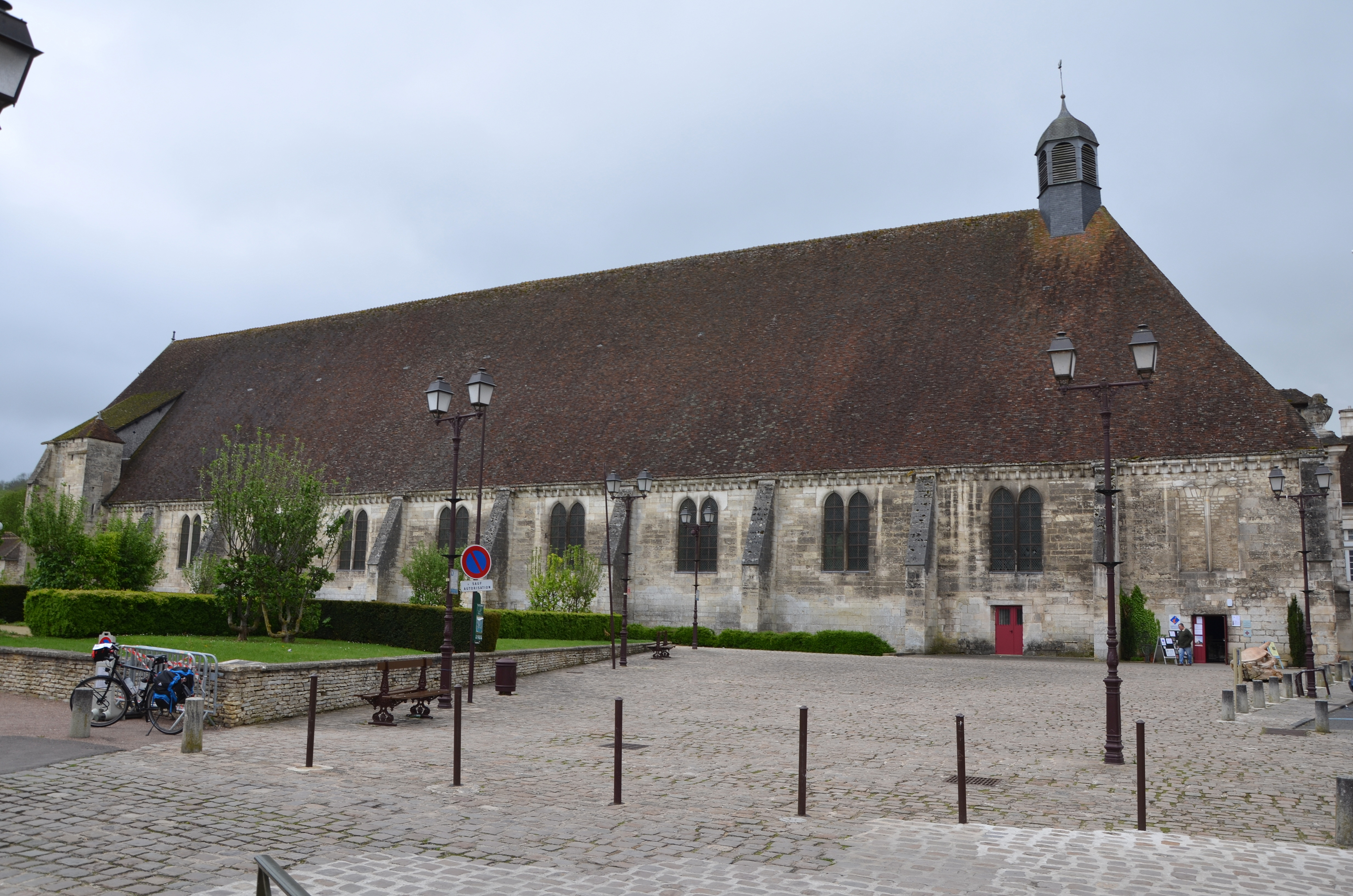 Ancien Hotel Dieu a Tonnerre, Yonne, France